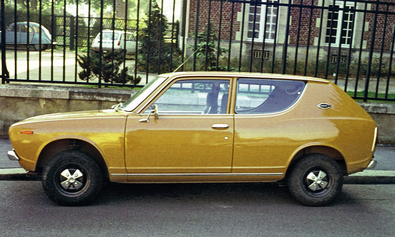 Datsun Cherry Estate St Quentin